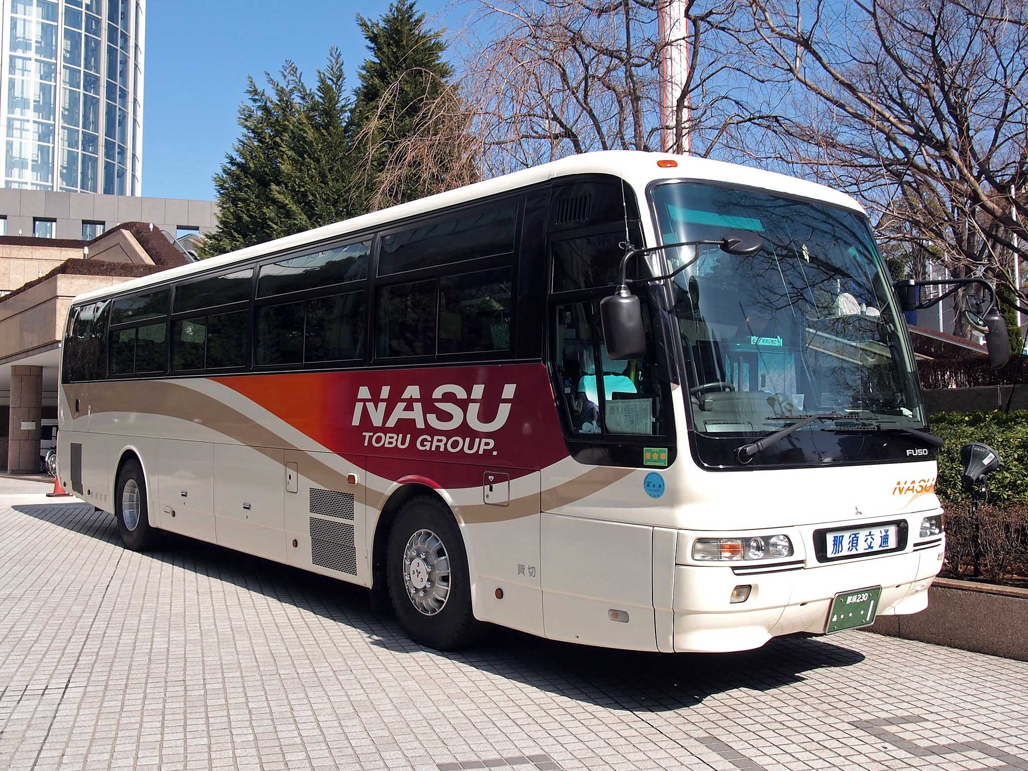 那須交通の三菱ふそうエアロバス。東野交通と同じく東武グループの観光標準色が採用されている。 型式：PJ-MS86JP 登録番号：那須230あ・・・1 撮影地：東京都文京区、東京ドームホテル（歩道より撮影）